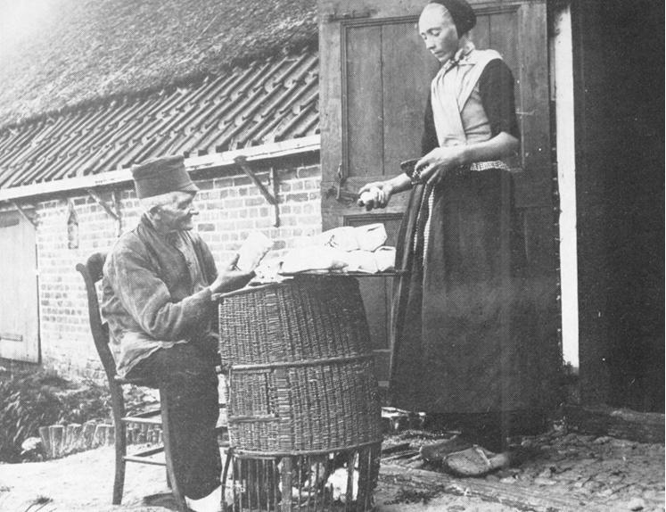 En Kiepkeerl in de Nedderlannen köfft un verköfft Woren bi en Fro vör en Buurnhuus. Ünnen in siene Kiep hett he Höhner. All beid draagt Holschen.